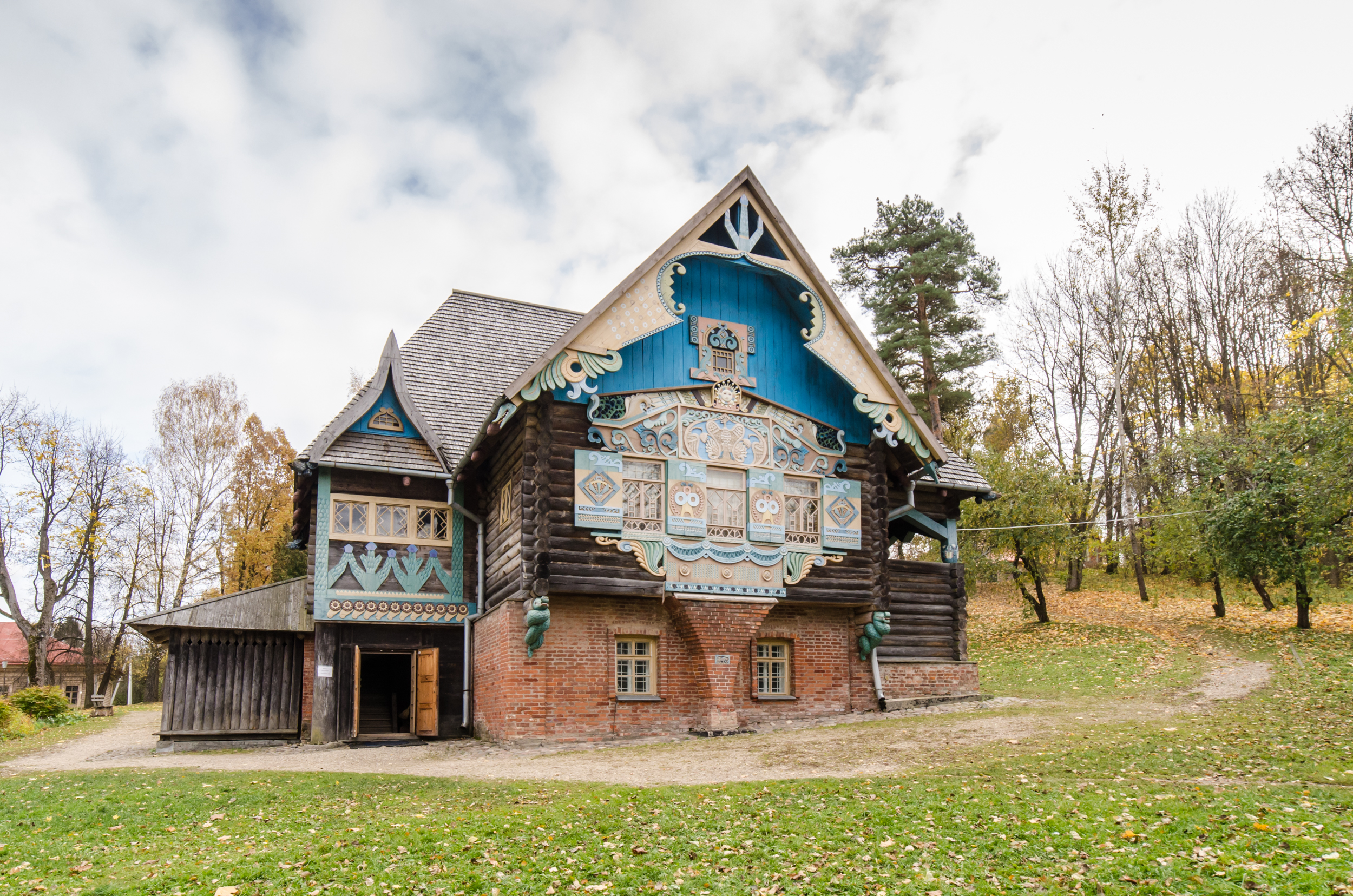 «Теремок»: с. Фленово, Талашкино, Смоленский район, Смоленская область